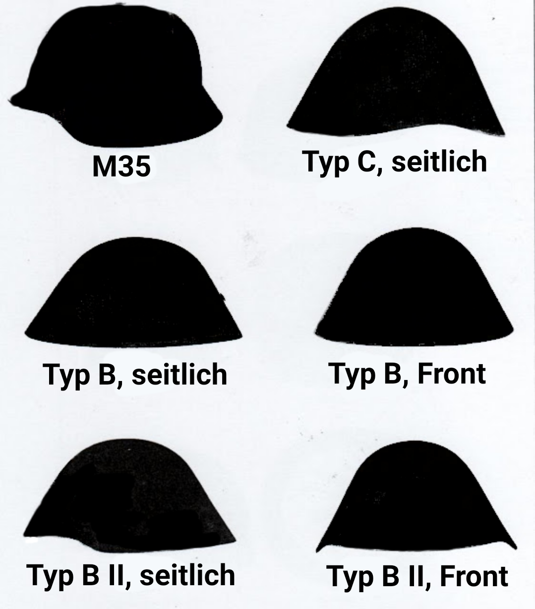 Helm M45 Varianten